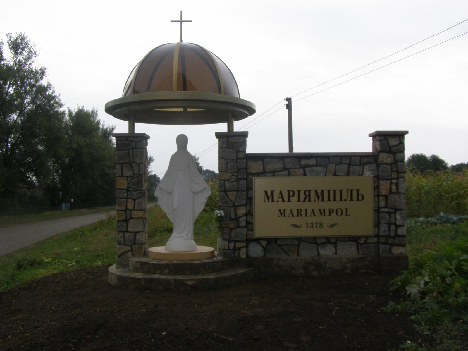 Tablica dwujęzyczna w Mariampolu na Ukrainie